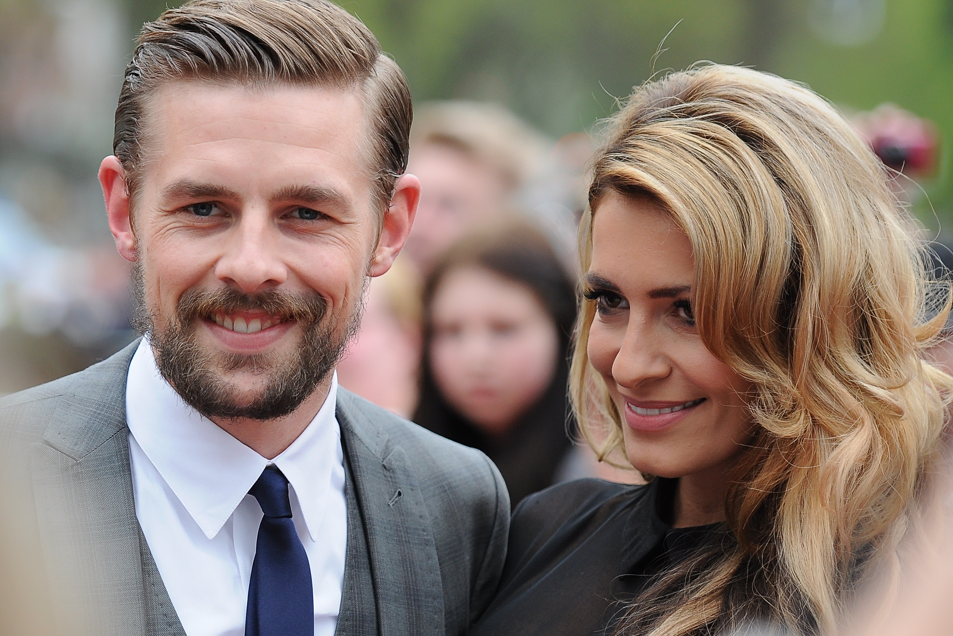 Klaas Heufer-Umlauf und ?? bei der Verleihung des Grimme-Preises 2014.